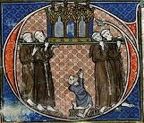 Graduel de Cologne Guérison 232v miracle